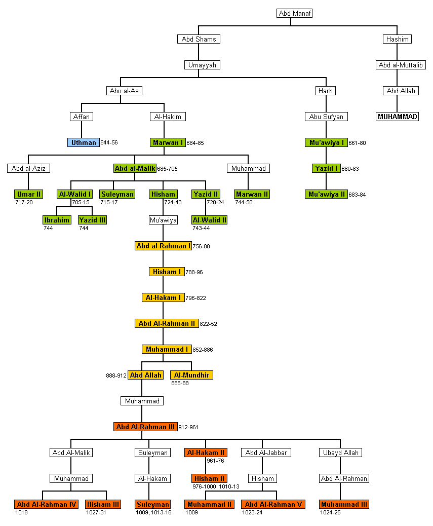 Árbol genealógico de los Omeyas, tanto los califas de Damasco como los emires y califas de Córdoba.